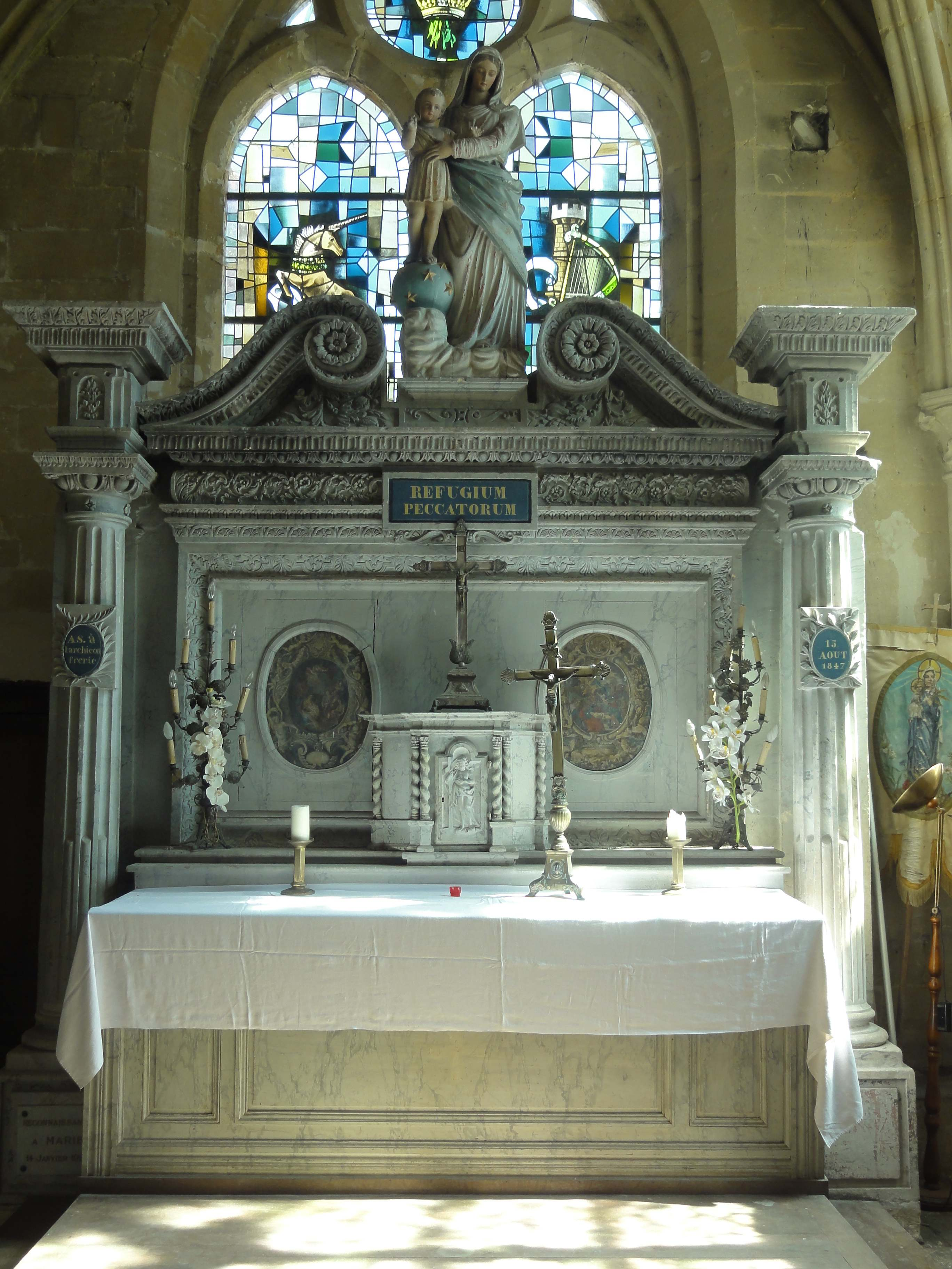 Retable de l'Assomption de la Vierge Marie devant le chevet de la chapelle latérale sud, consacré en 1847 (il daterait cependant de 1830).